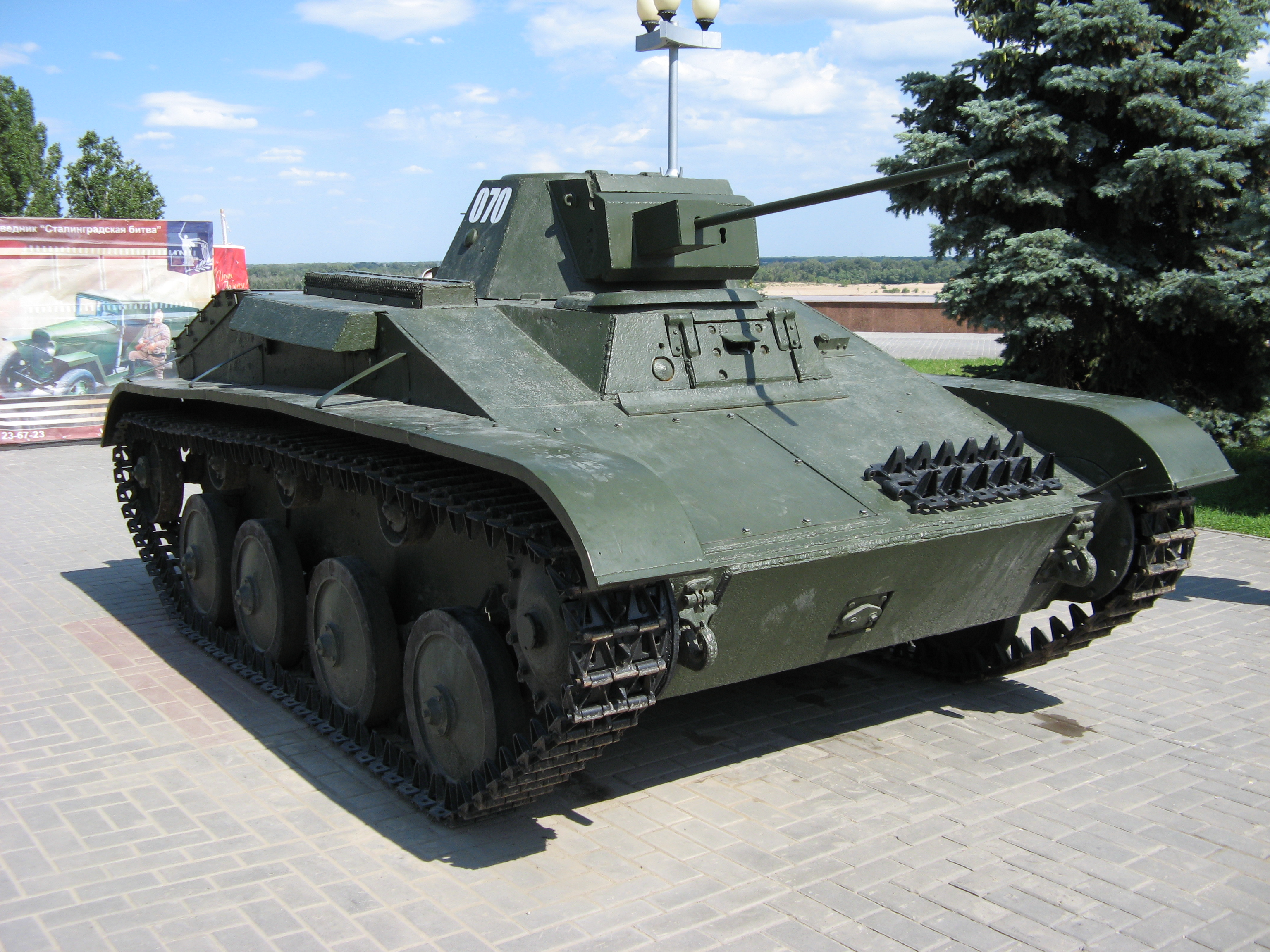 Танк Т-60 возле музея-панорамы "Сталинградская битва" в Волгограде